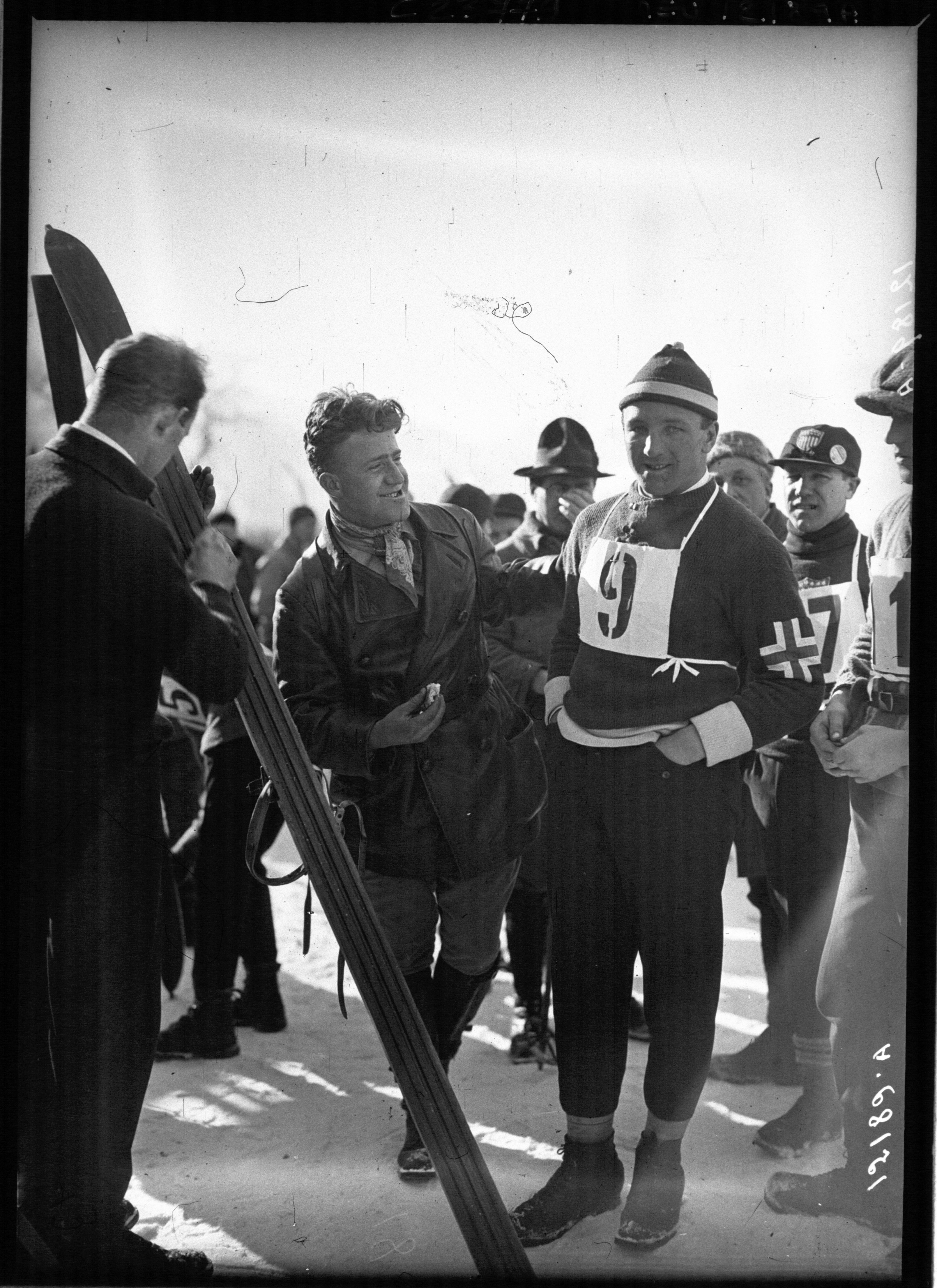 Chamonix 1924 : concours de saut : Thams félicité après son record du monde